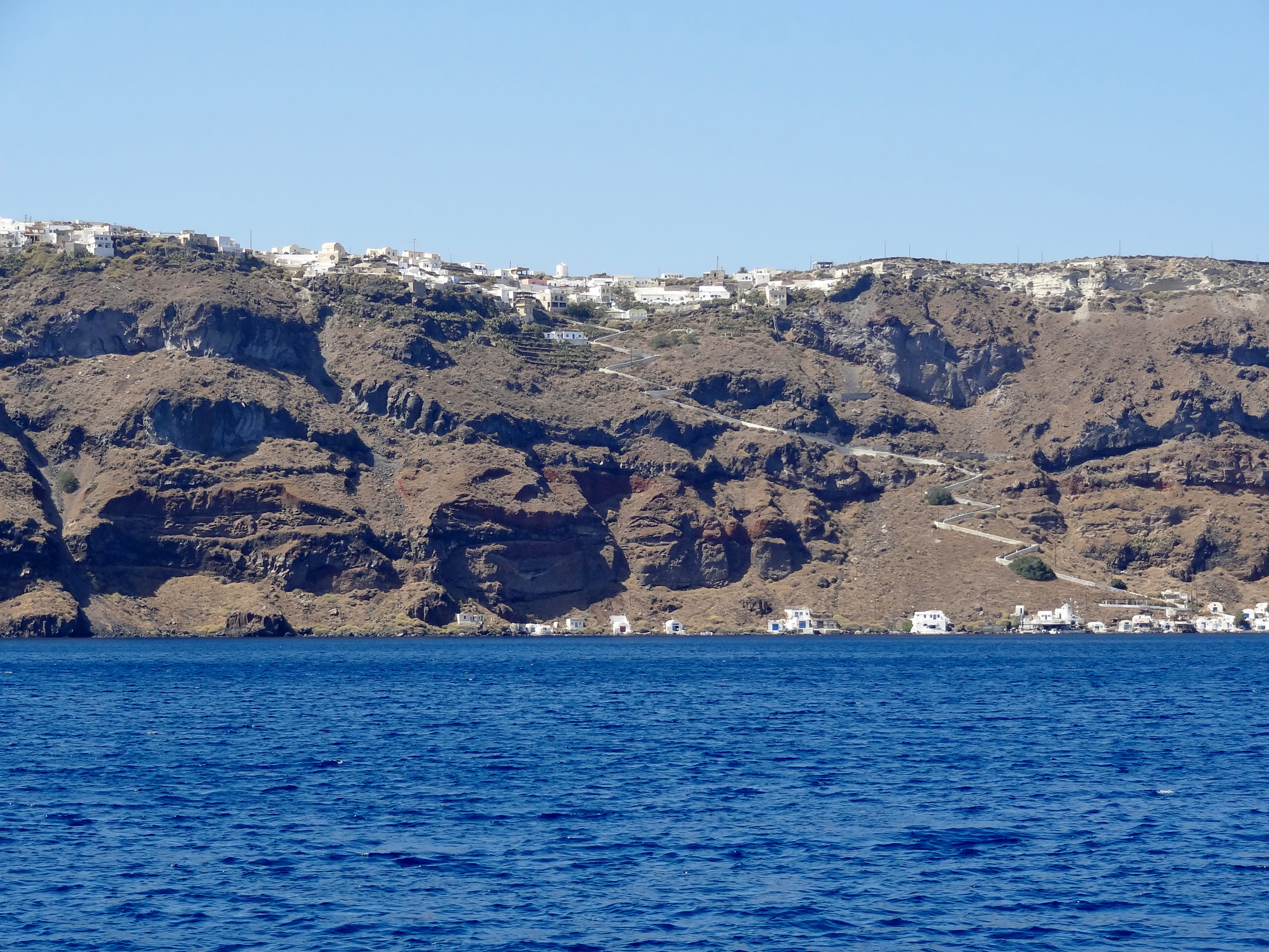 Manolas und Korfos auf der Insel Thirassia (Thirasia) an der Caldera von Santorin, Kykladen, Griechenland